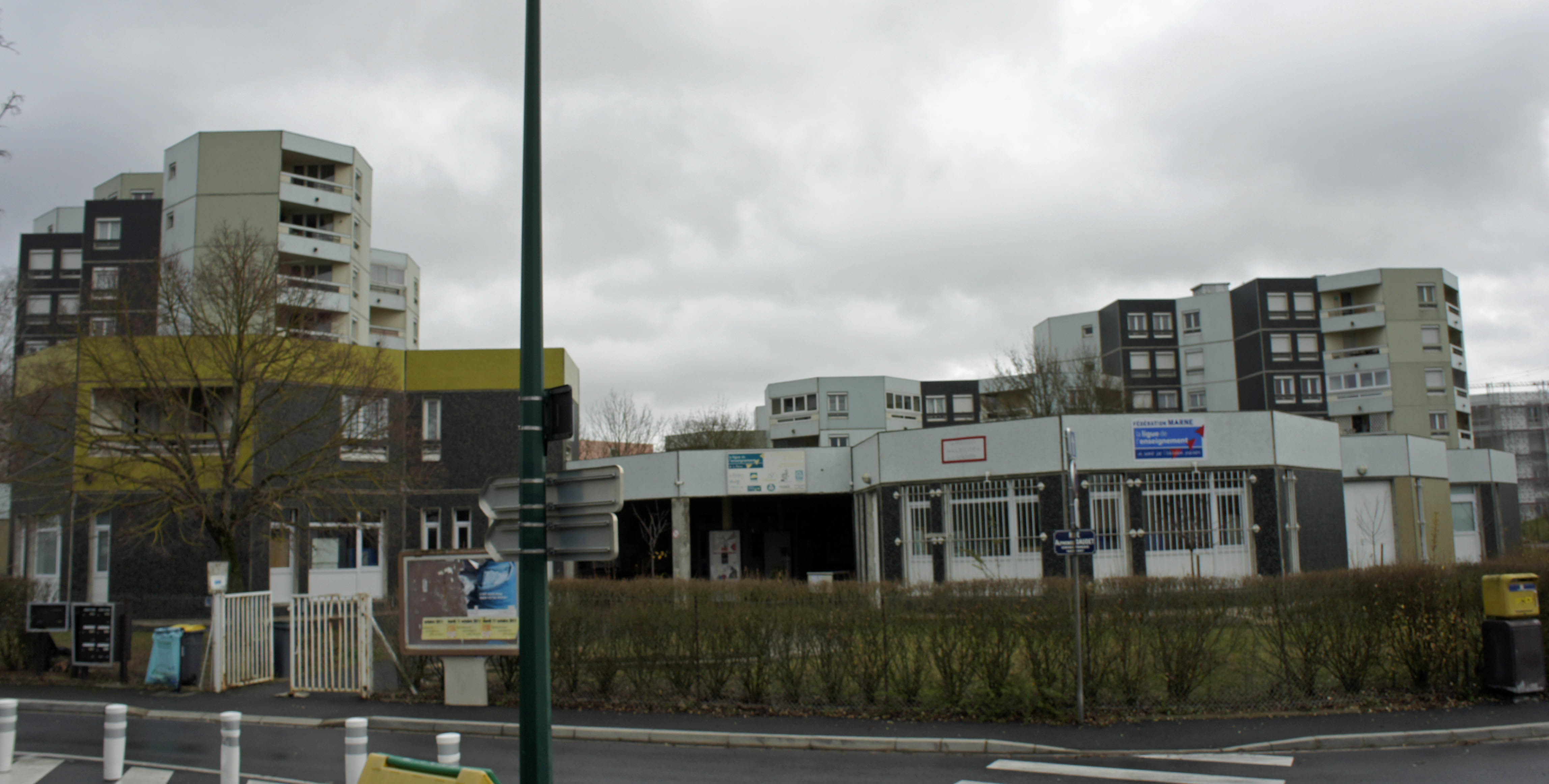 Les_Hexagones_dans le quartier_Croix ROuge de Reims.